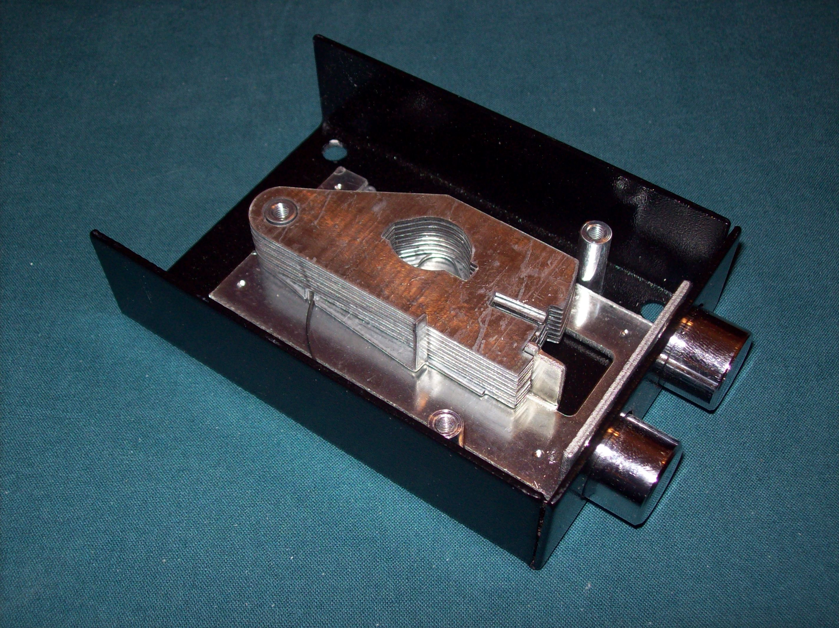 Tresorschloss geöffnet